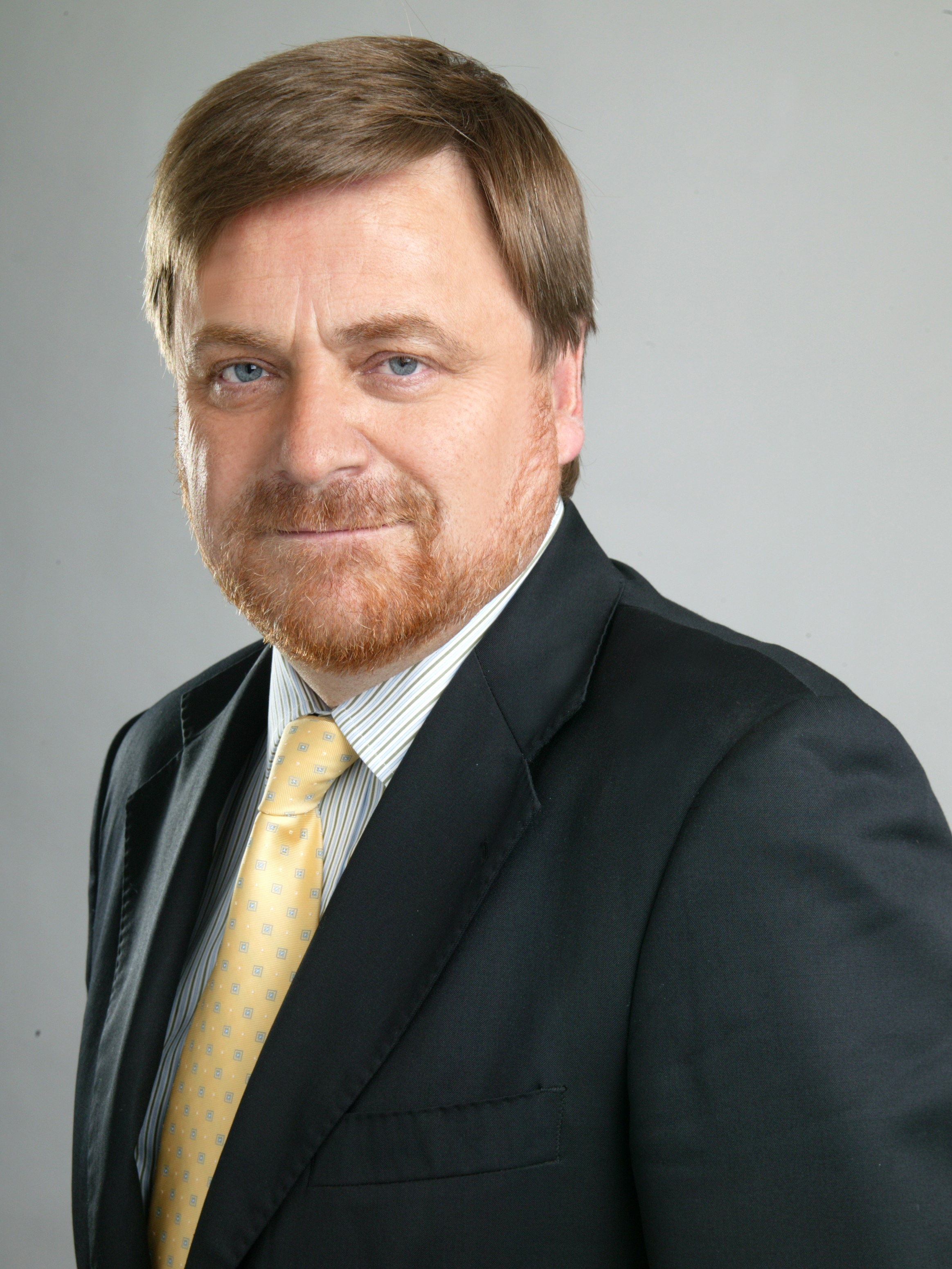 Hernán De Solminihac, ingeniero chileno.